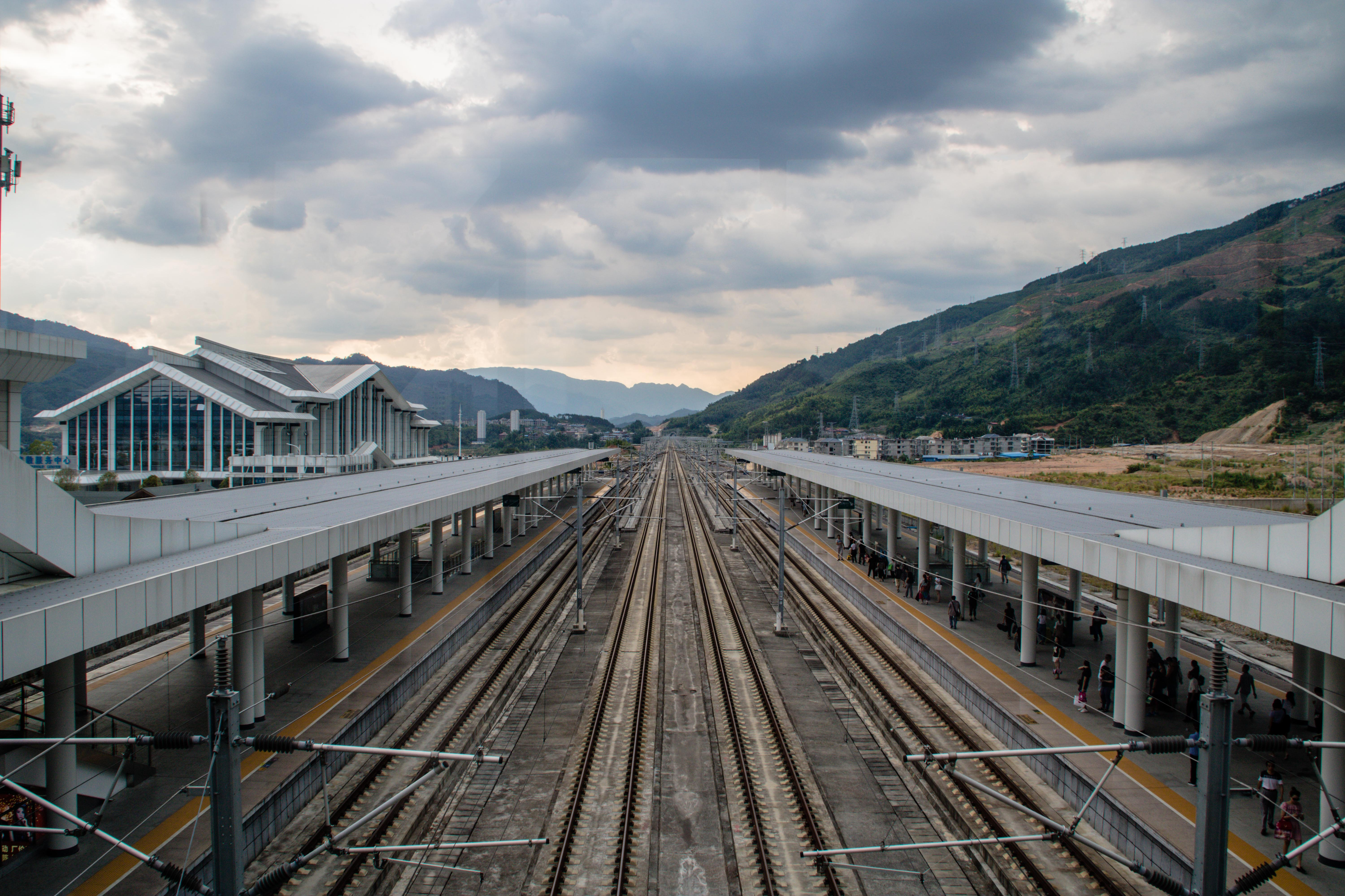 中文（中国大陆）: 南平北站正线，往合肥、龙岩方向